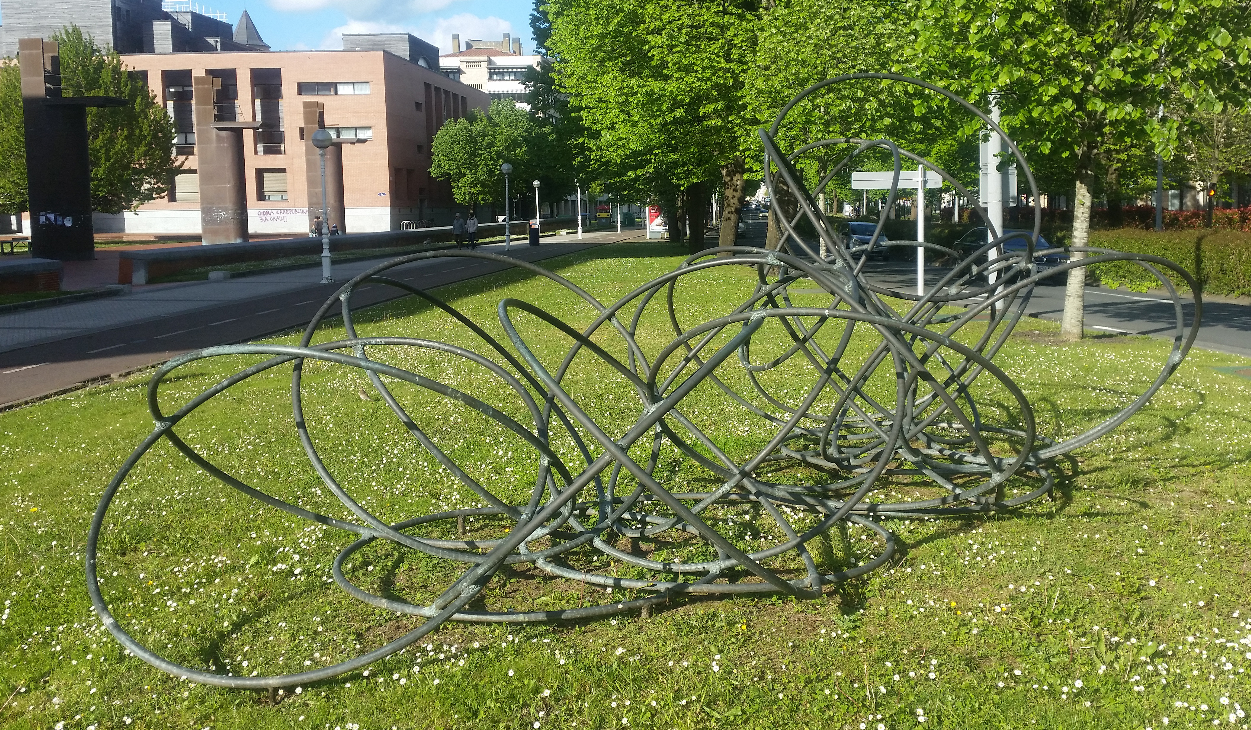 Escultura de José Zugasti